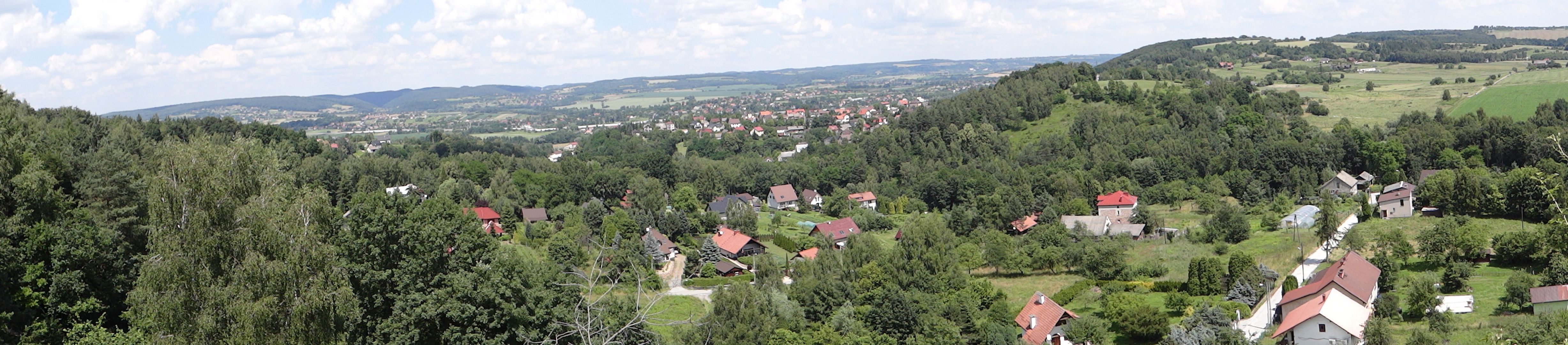 Nielepice. Widok ze Skały na Dębowej Górze